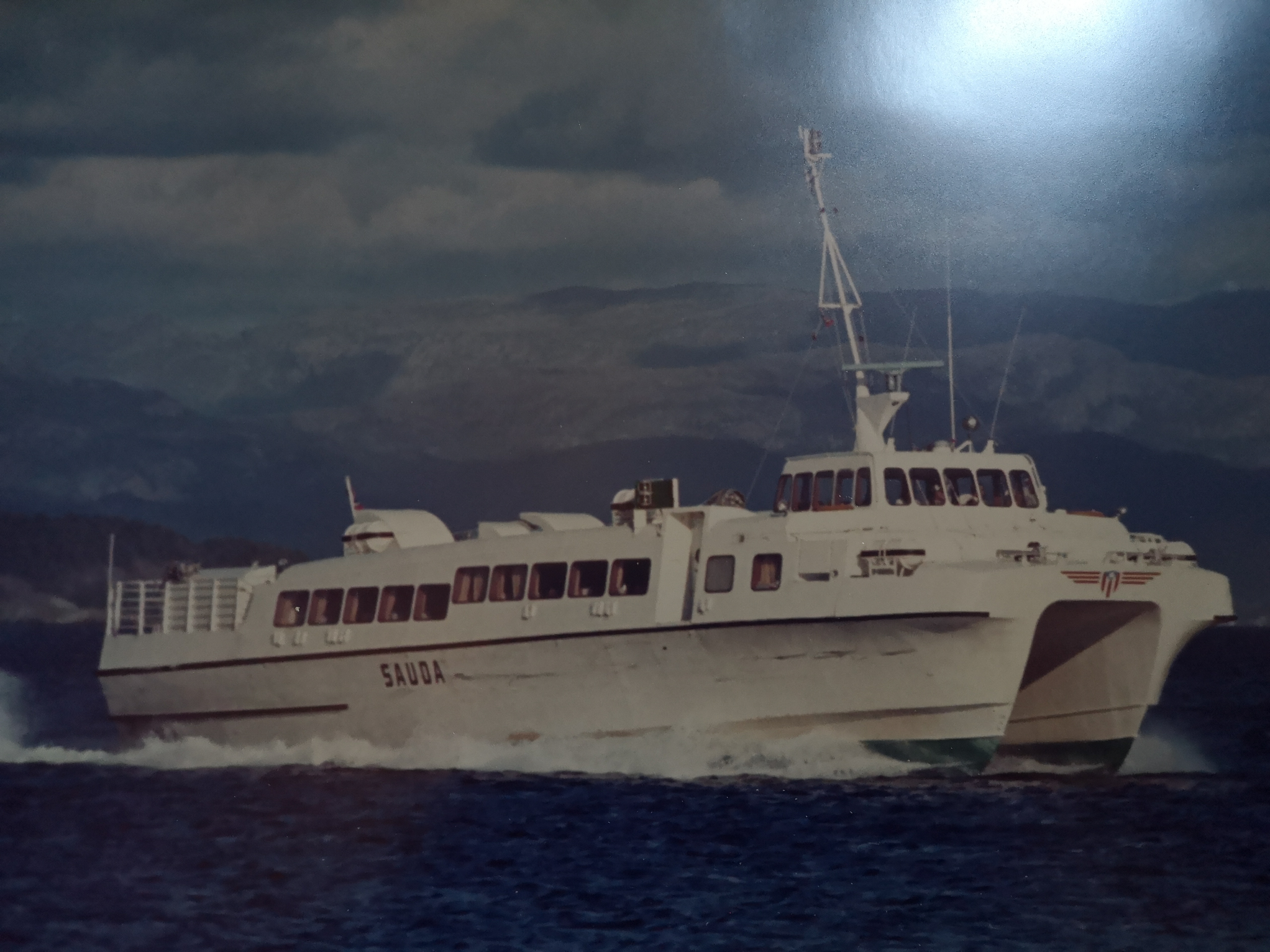 MS Sauda bygget hos Westermoen i 1972